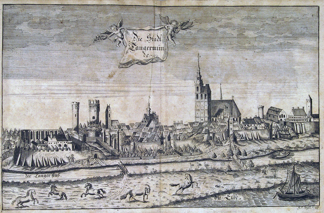 Tangermünde, aus: Küster: Antiquitates Tangermundenses. Berlin 1729.